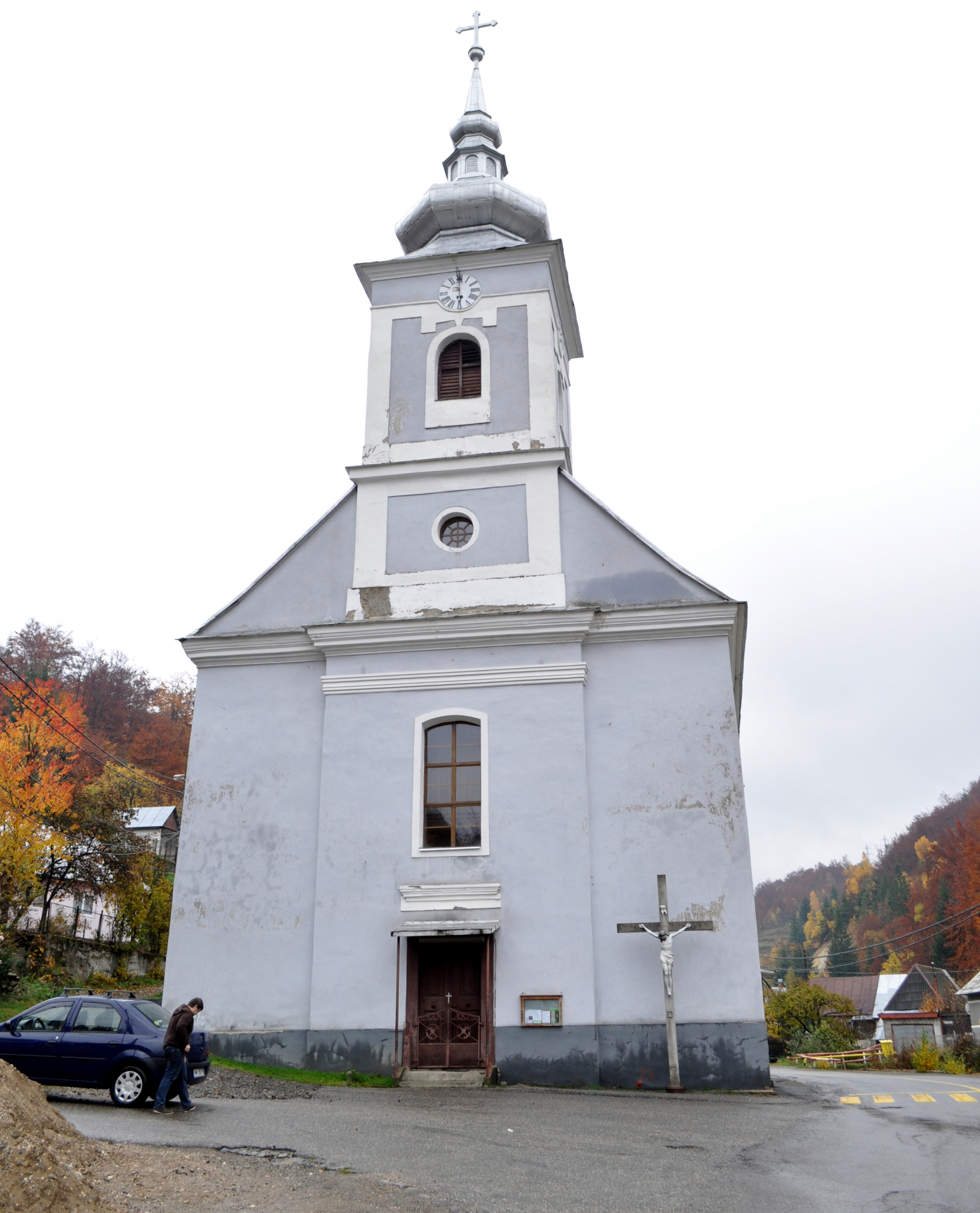 Biserica romano-catolică „Sfânta Varvara” (Szent Borbála) din Cavnic, județul Maramureș